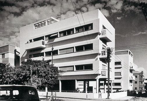 he:בית אנגל בת"א, בסגנון הבינלאומי, he:אדריכלות: he:זאב רכטר